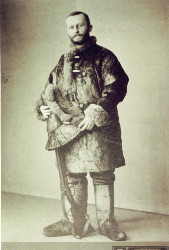 Bernhard Hantzsch 1909